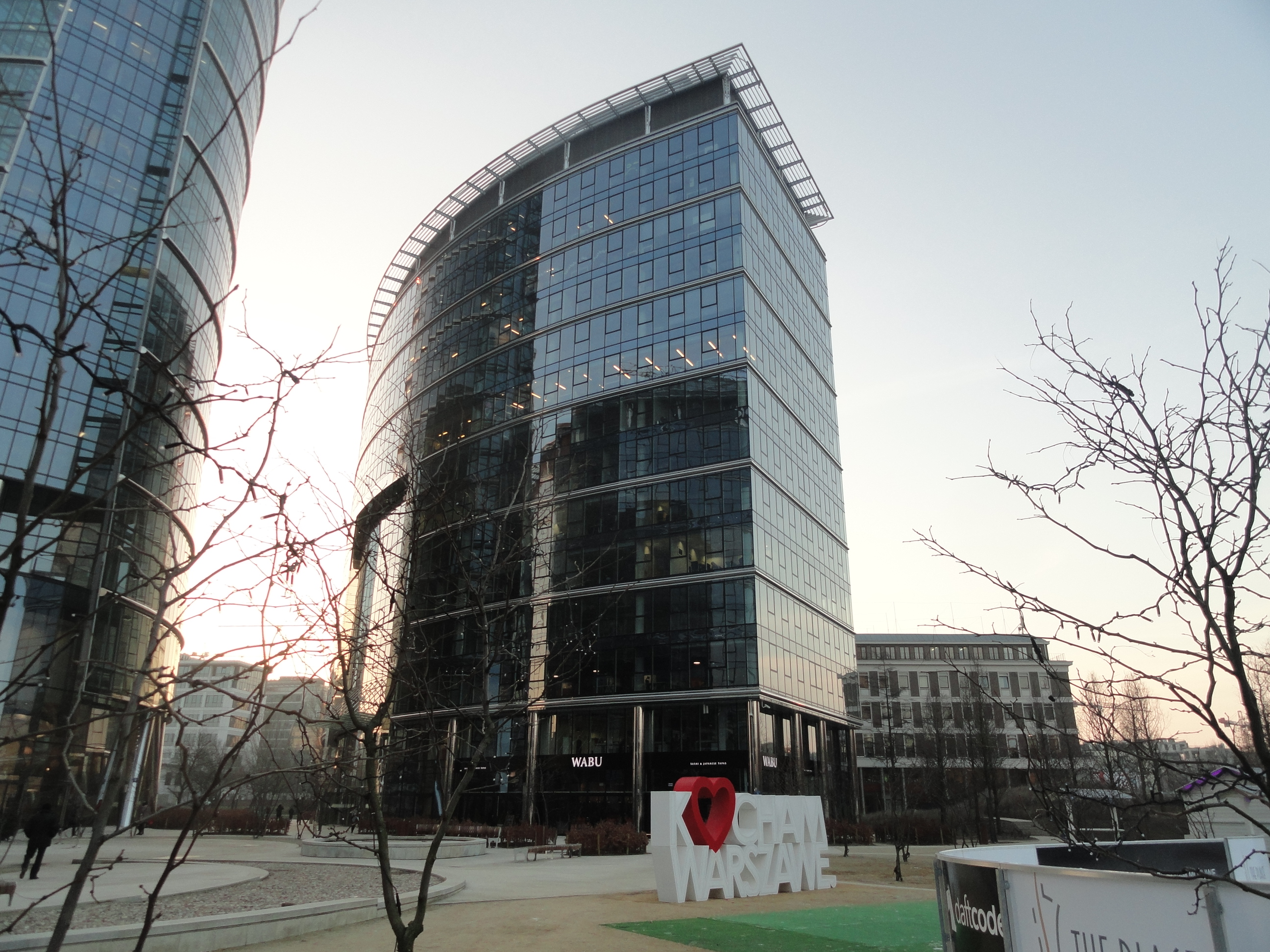 Widok na kompleks biurowy Warsaw Spire w Warszawie. Plac Europejski.